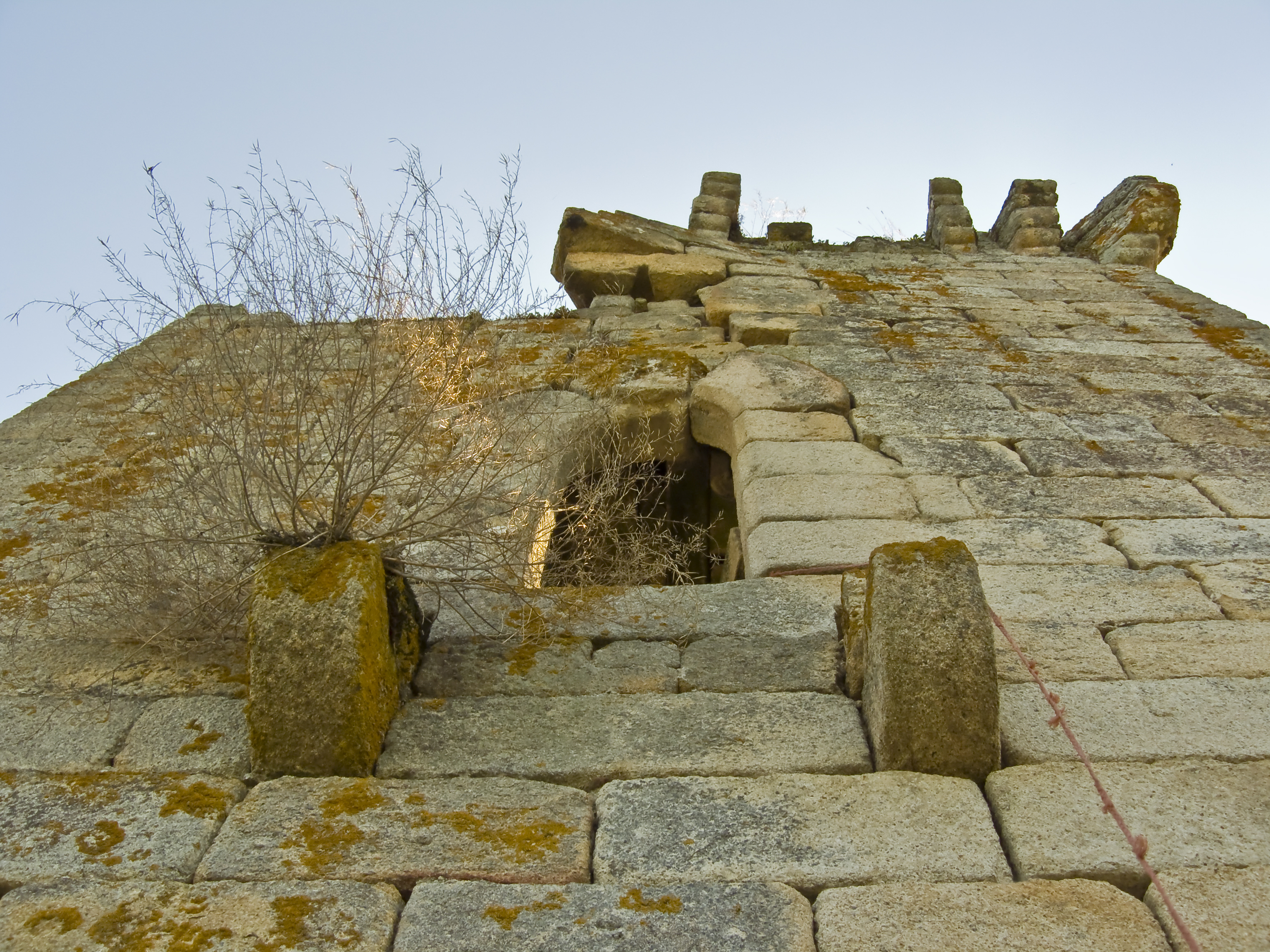 Torre de Sande, Cartelle, Ourense